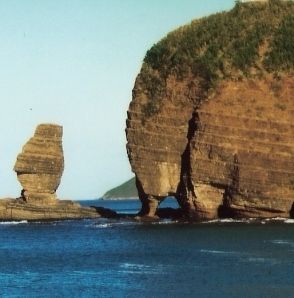 Photo de la Roche Percée et du Bonhomme de Bourail